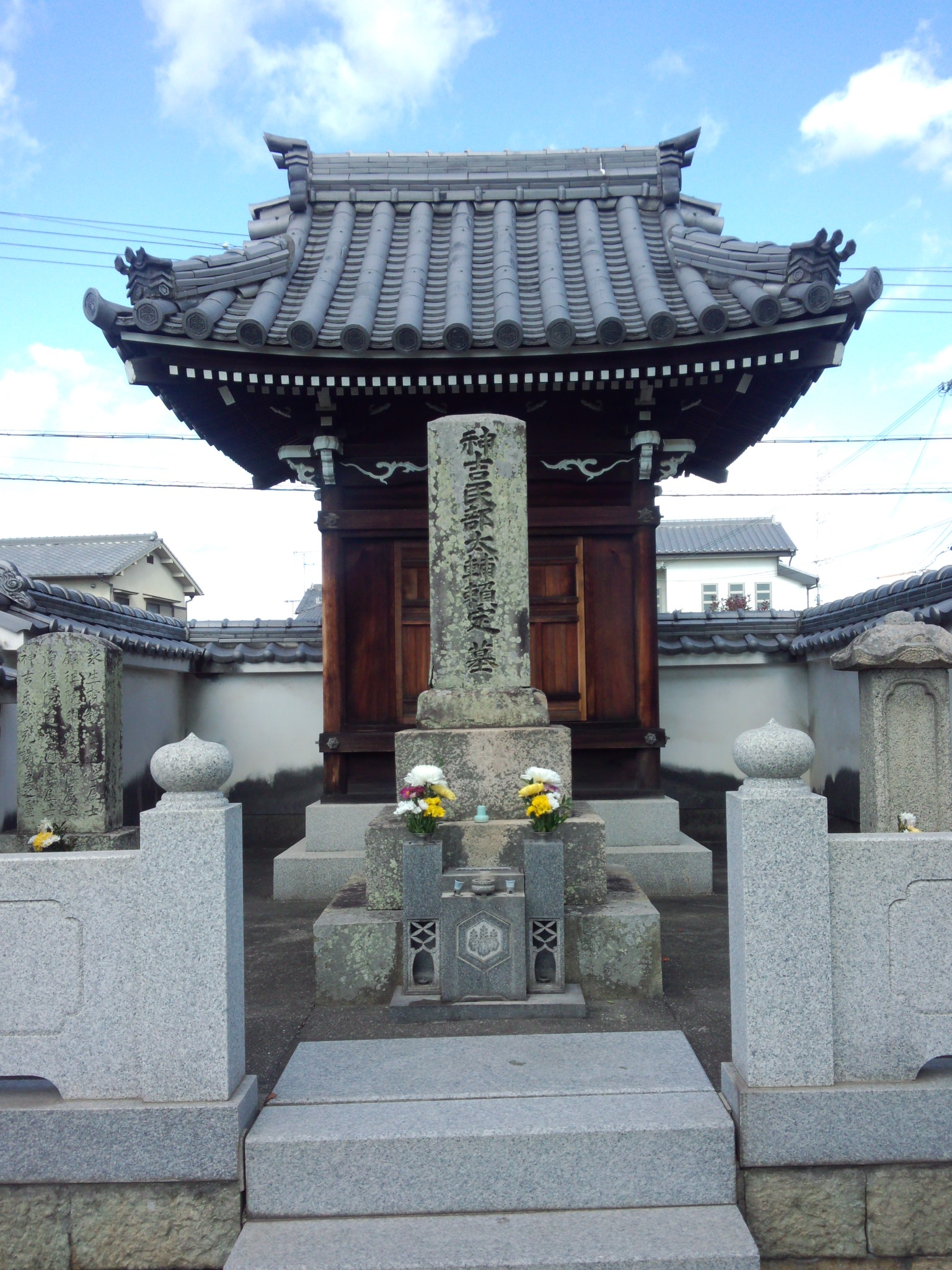 神吉頼定氏の墓石